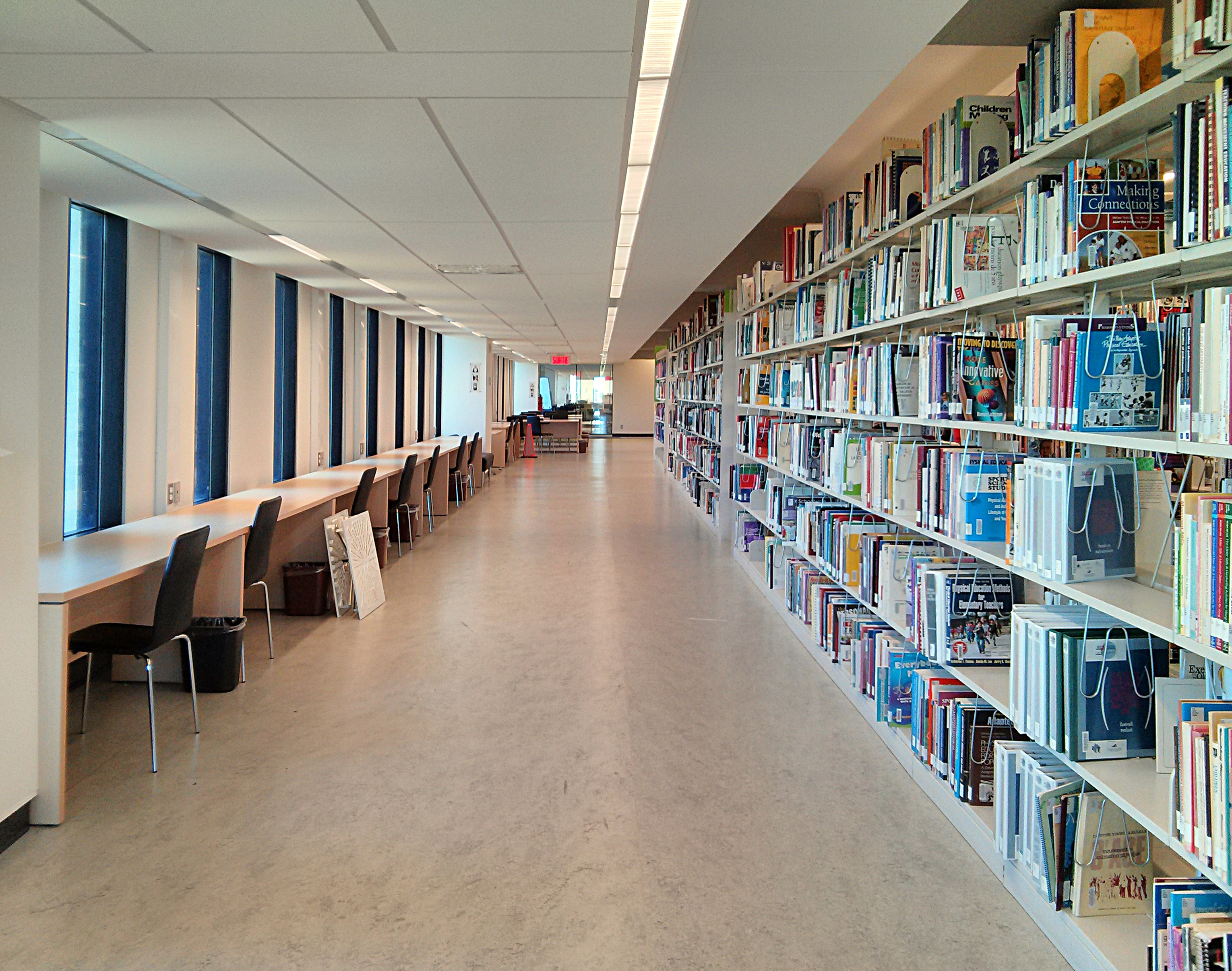 Quatrième étage de la Bibliothèque au Pavillon Jean-Charles-Bonenfant, Université Laval